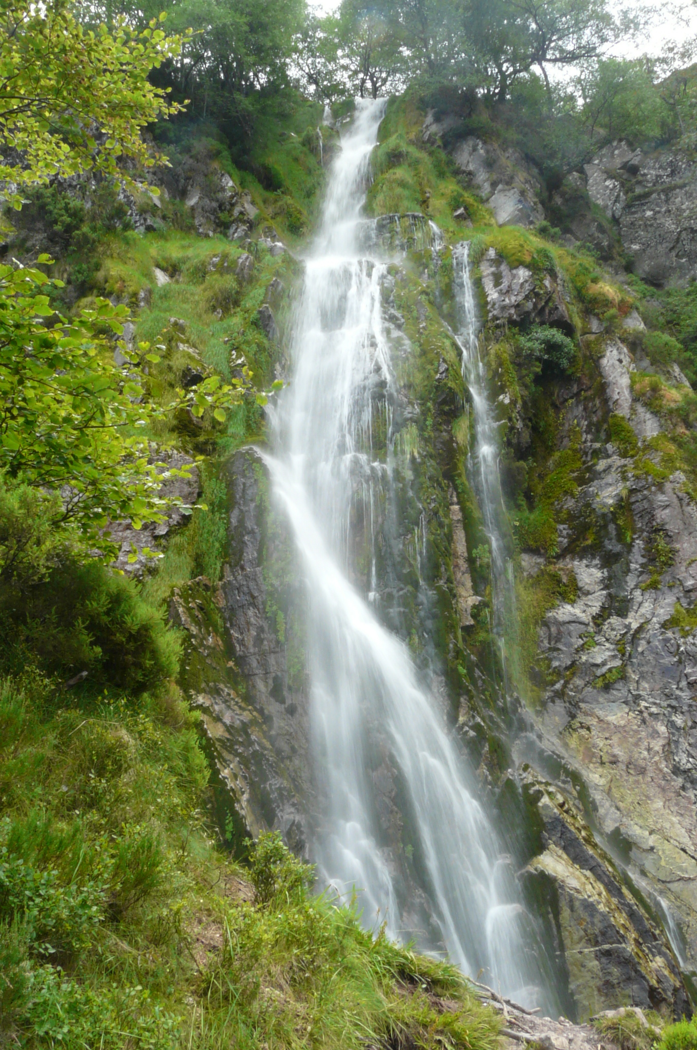 Cascada del Taballón en el Parque Natural de Redes